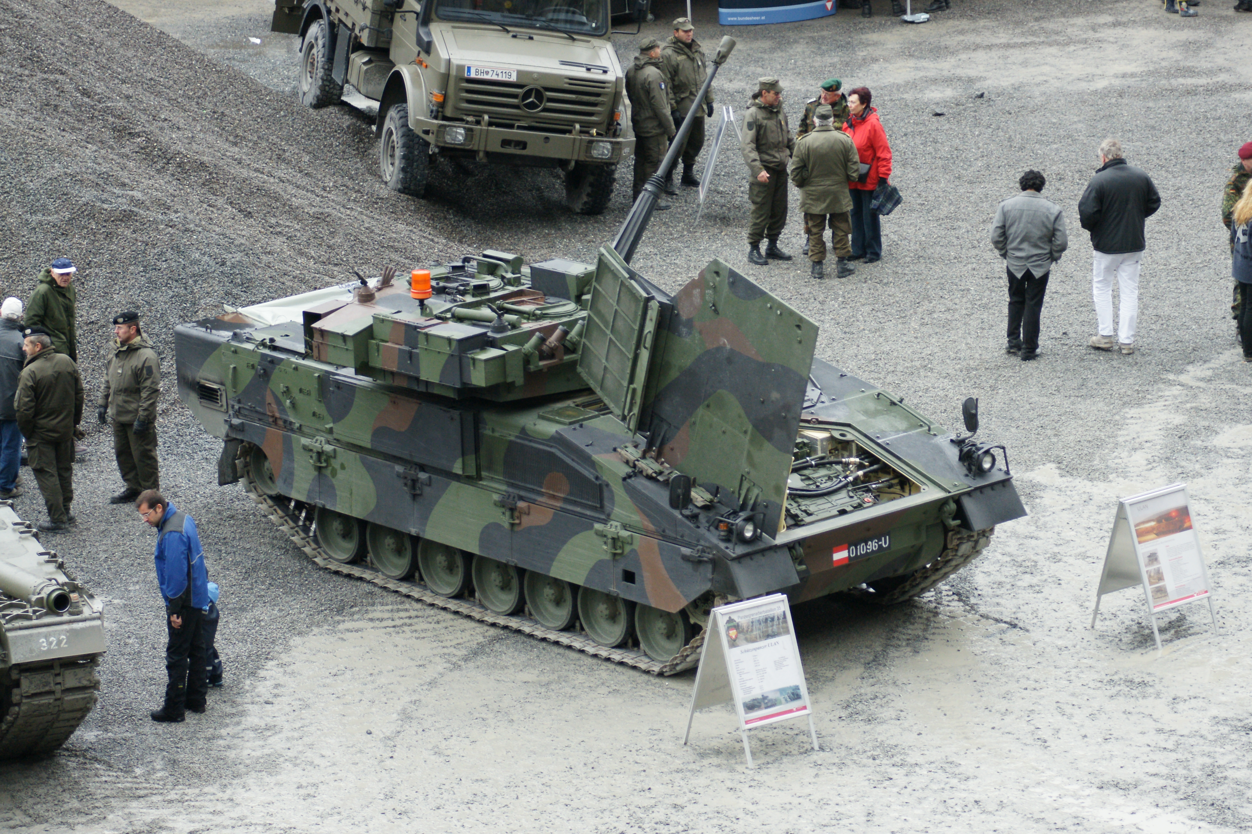 Im Zuge einer Road-Show zeigte das Österreichische Bundesheer im Dornbirner / Hohenemser Steinbruch den Ascod (Austrian-Spanish Co-operative Development), der Name eines Panzerfahrzeugs, das in einer Österreichisch-Spanischen Co-Produktion gefertigt wird. Der Schützenpanzer Ulan wird von der österreichischen Steyr-Daimler-Puch Spezialfahrzeug GmbH und der Pizarro von der spanischen Santa Bárbara Sistemas gefertigt.